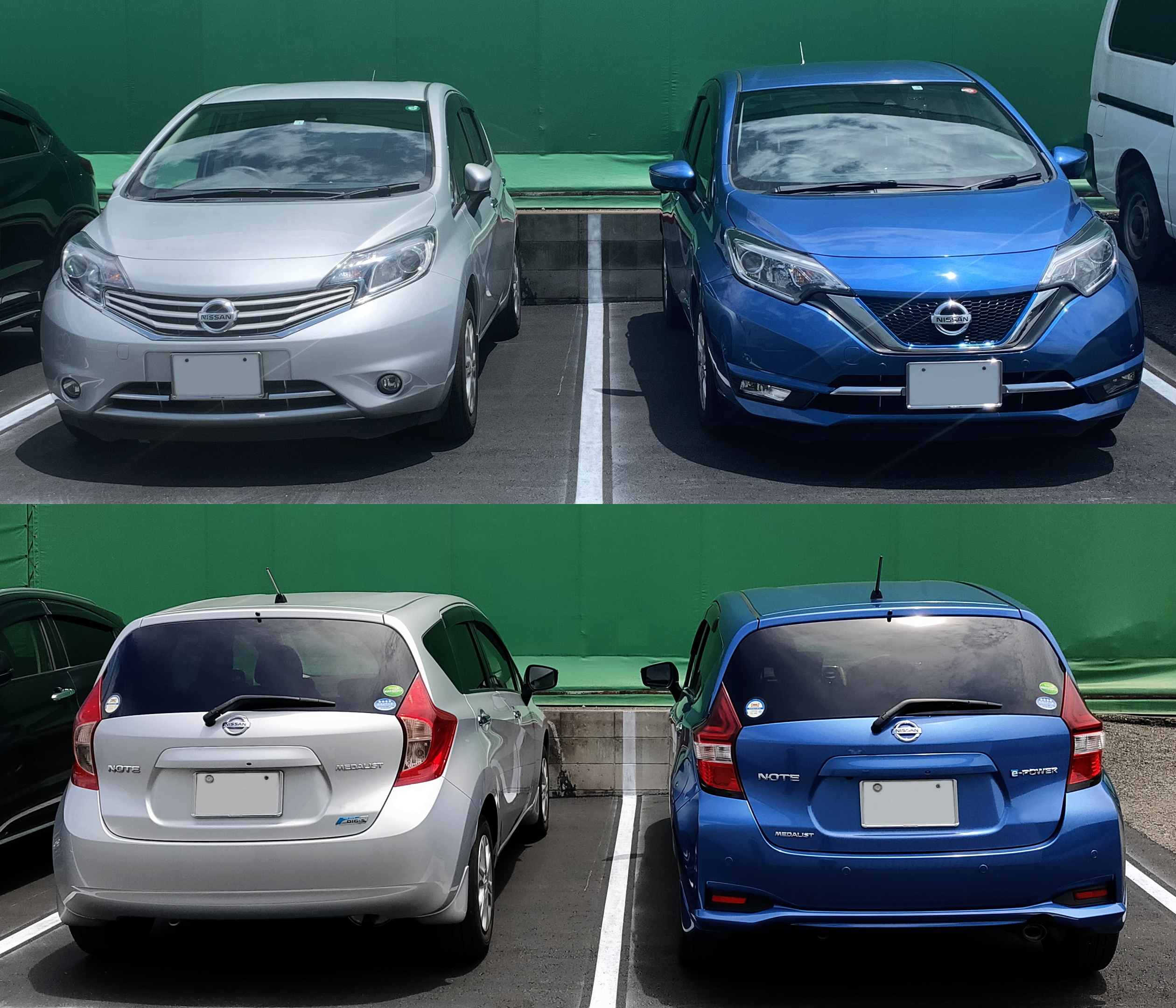 日産・ノート E12型 前期型（ガソリン車）と後期型（e-POWER）